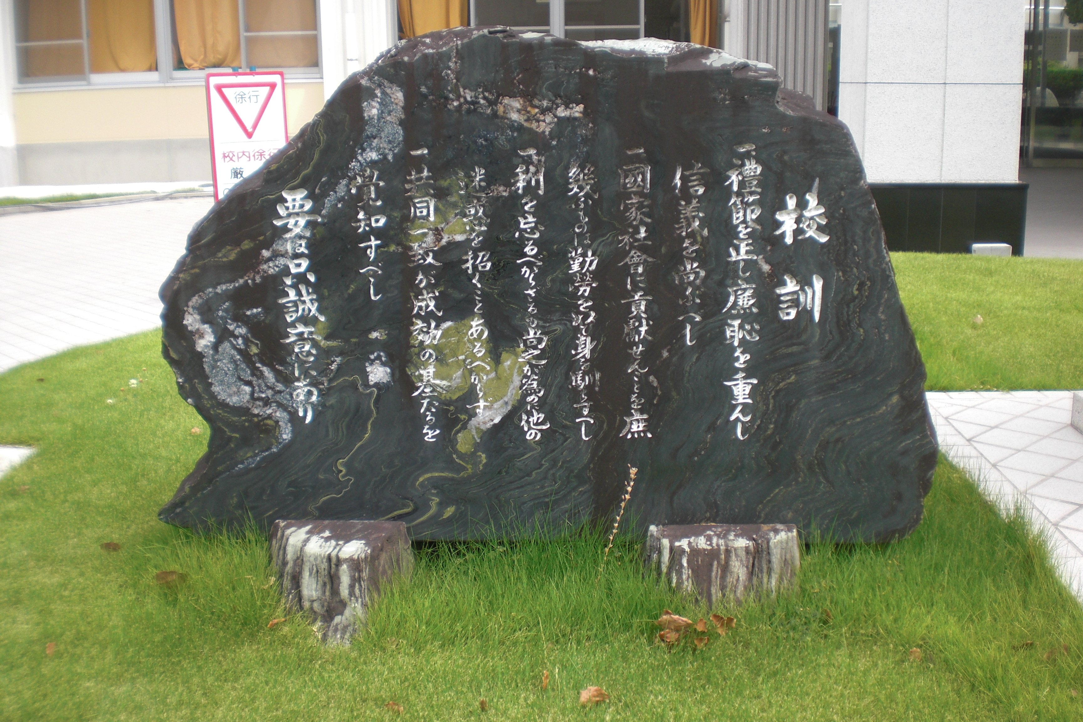 安城農林高校の校訓